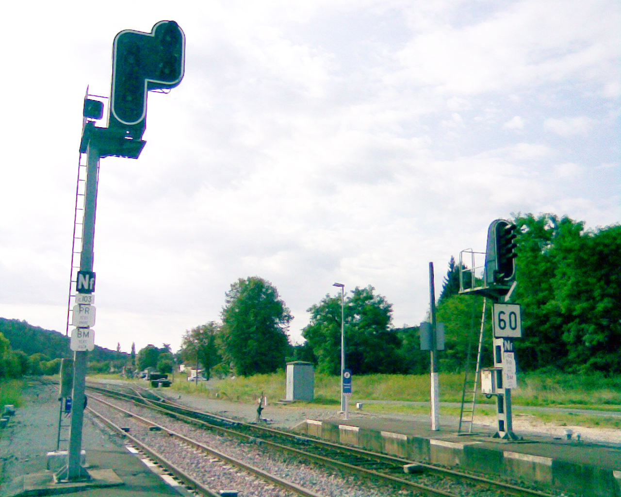 A la sortie de la gare de Niversac (commune de Saint-Laurent-sur-Manoire, Dordogne), les signaux lumineux indiquant la bifurcation entre les lignes Coutras - Tulle et Niversac - Agen. Sur le poteau de chaque signal, on remarque les mentions PR et BM qui indiquent le type de signalisation utilisé sur chaque ligne : bloc automatique à permissivité restreinte vers Brive et Tulle, bloc manuel vers Agen.